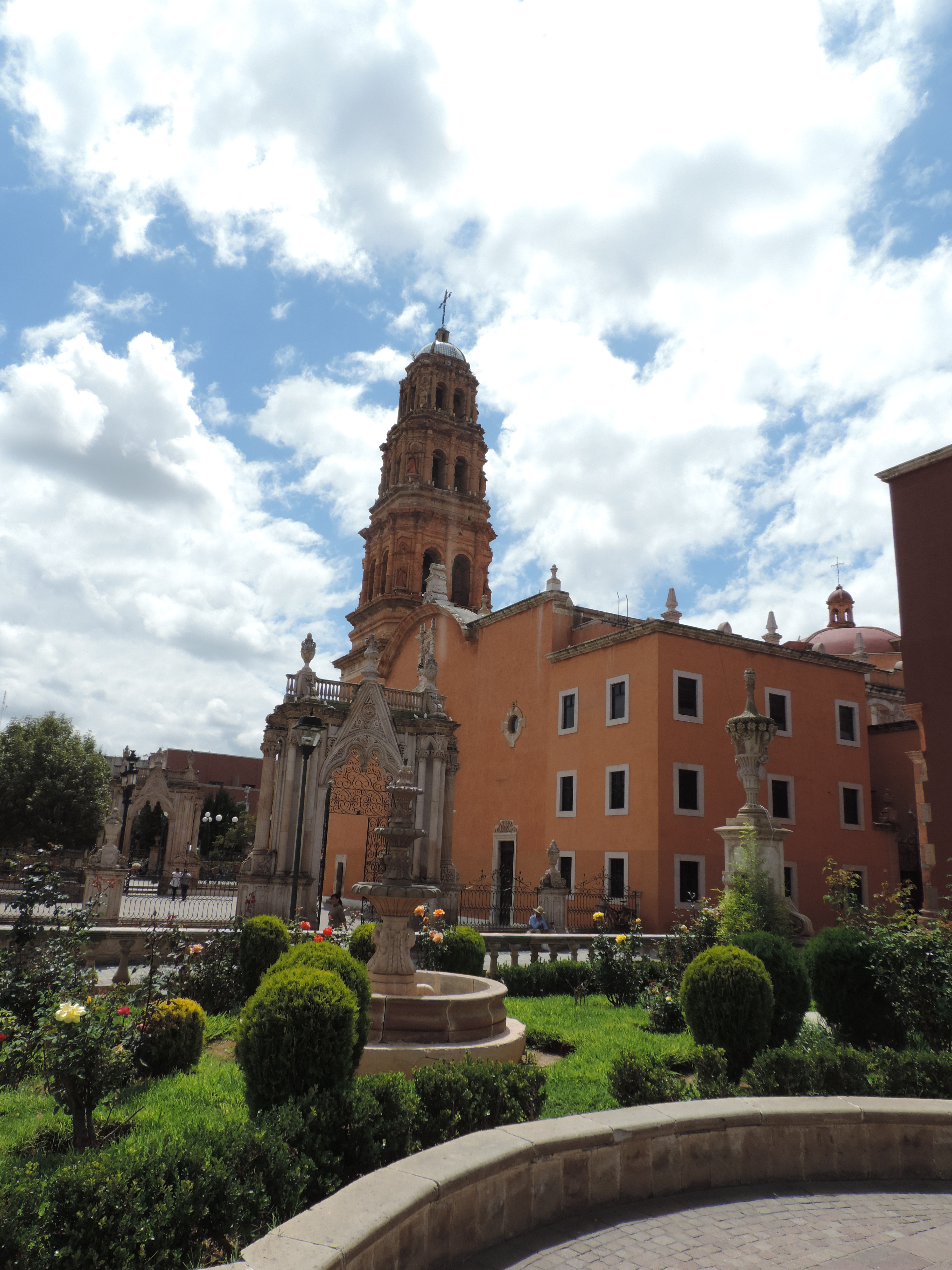 Templo de la Purificación